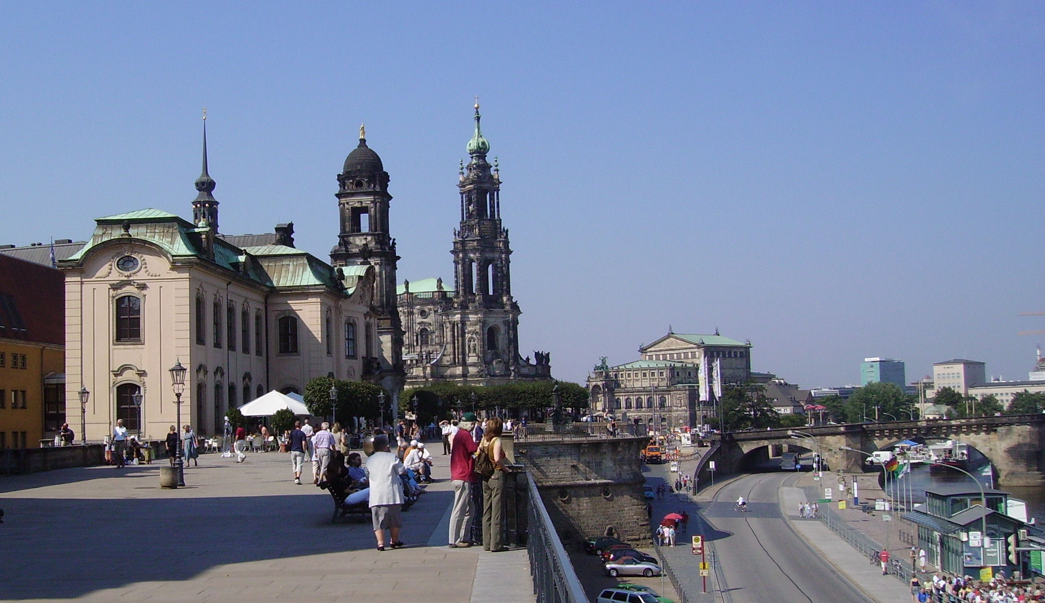 Dresden, Germany